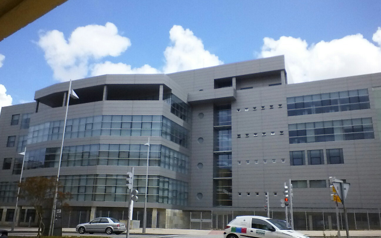 Edificio de la Agencia Tributaria de la delegación provincial de Hacienda de Pontevedra